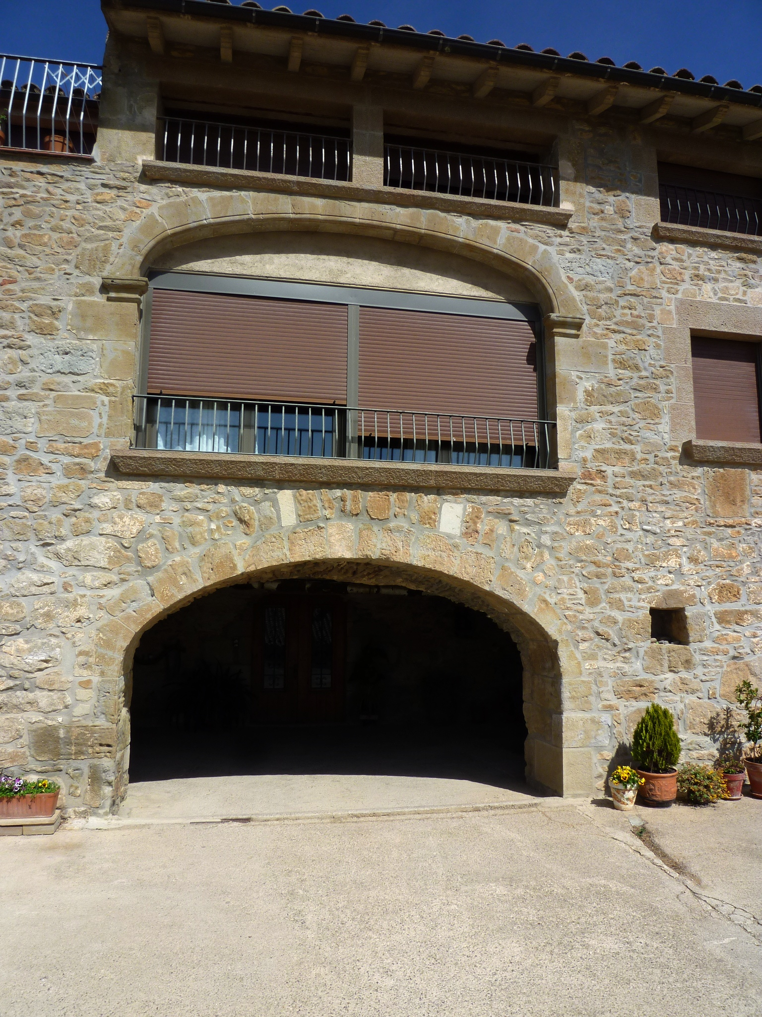 Masia de Trullas (Clariana de Cardener): detall del portal